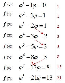 El número áureo aparece formando parte de una expresión de la serie de Fibonacci.